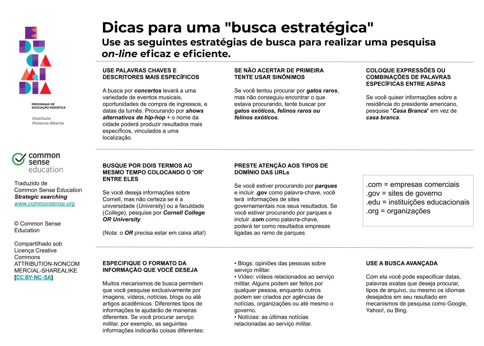 Dicas para busca de informação na web